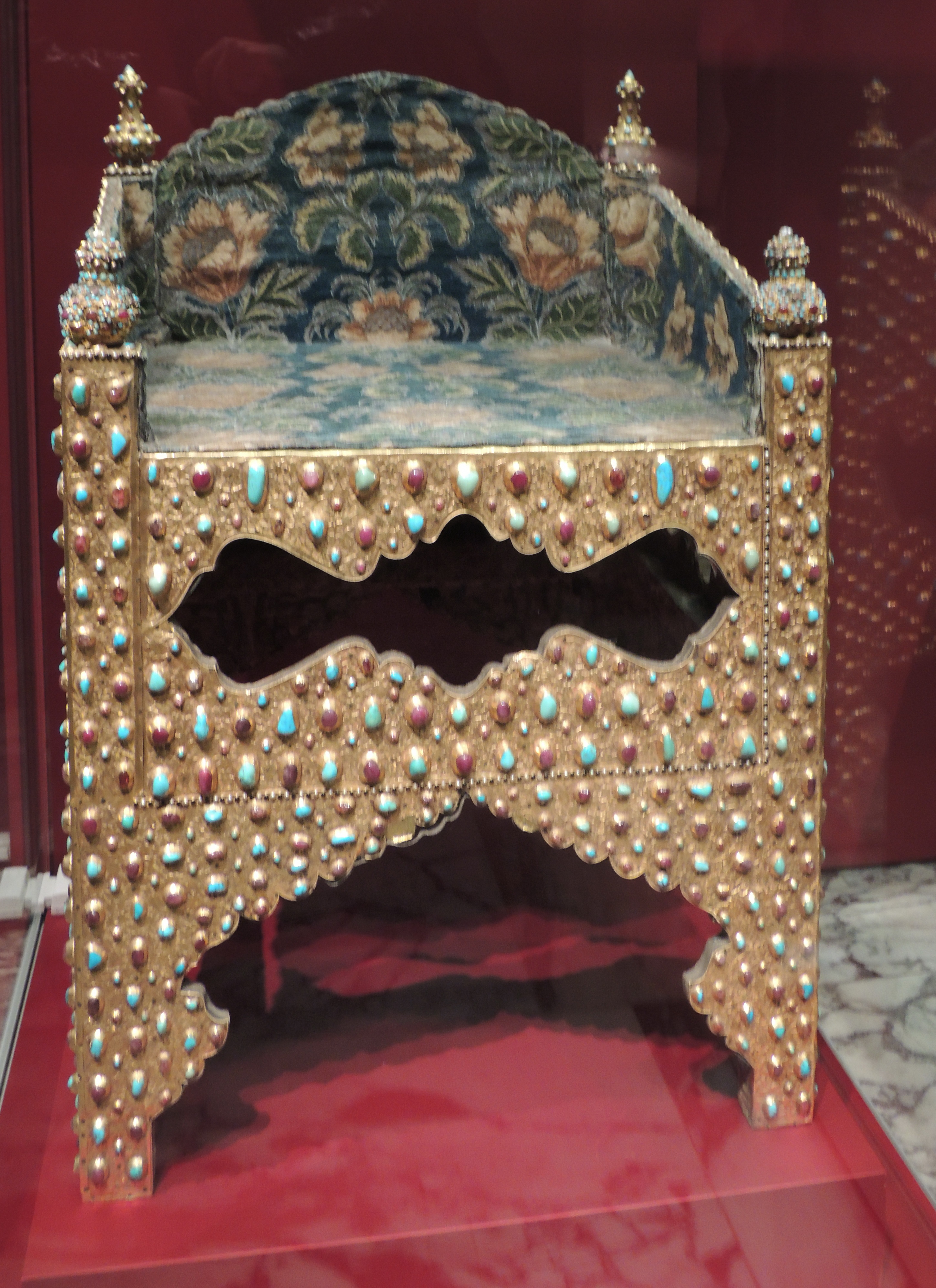 Трон Бориса Годунова